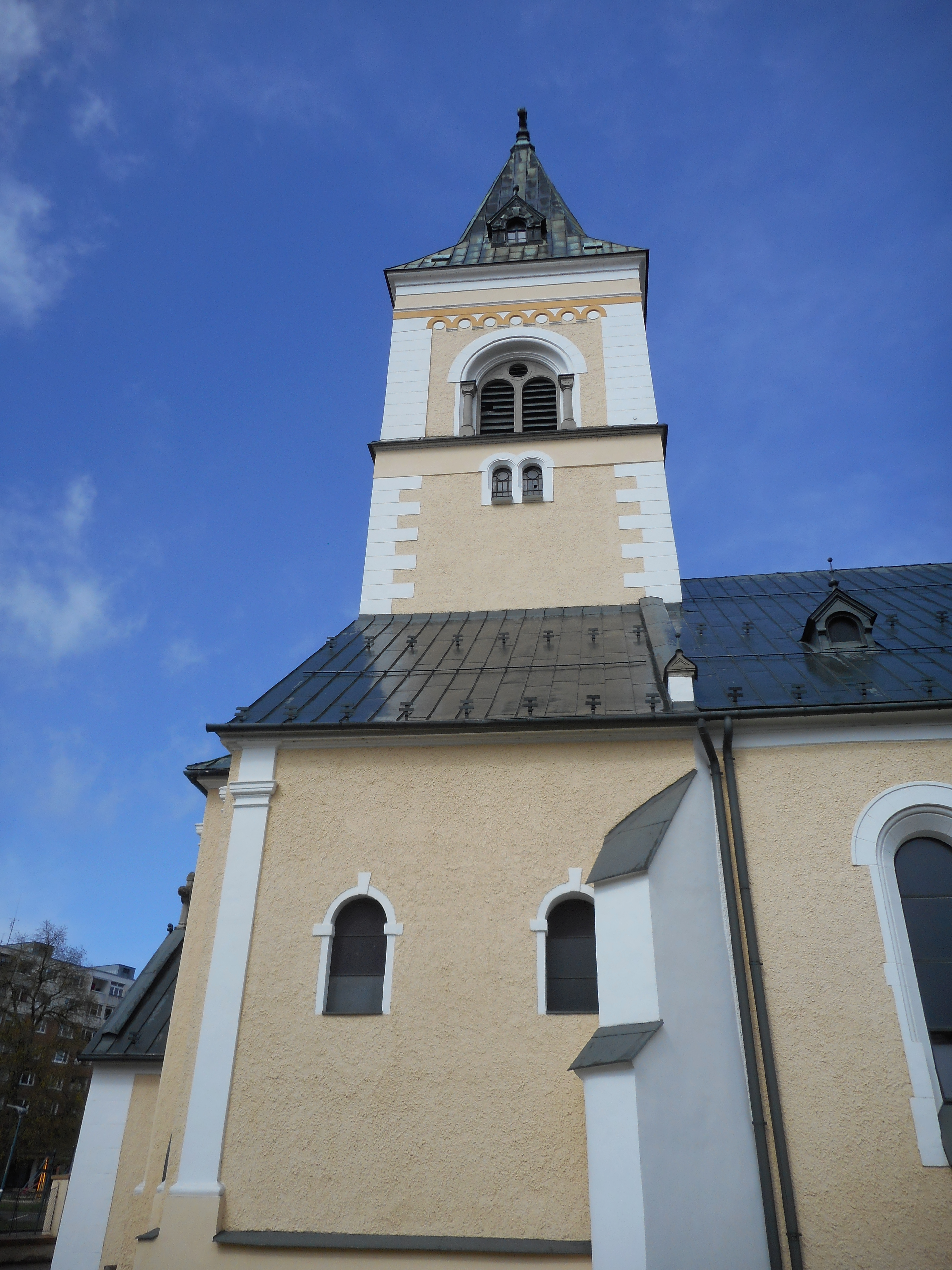 Pohľad južný